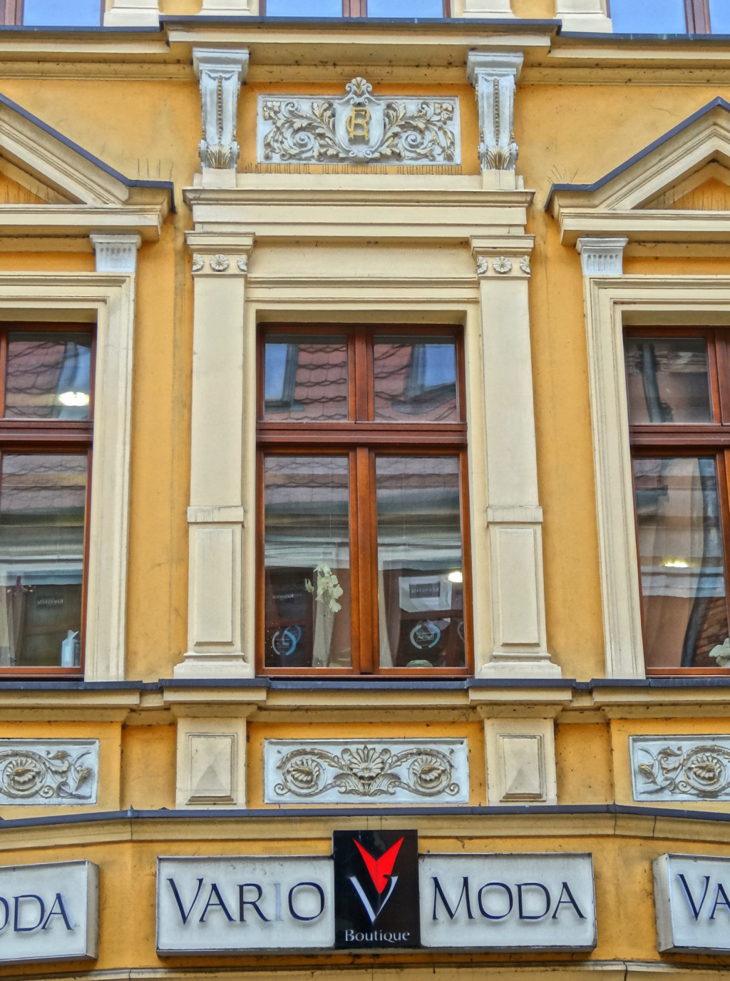 Kamienica przy ul. Długiej 6 w Bydgoszczy (pocz. XIX w.)